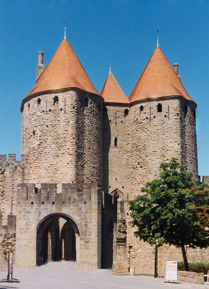 Porta Narbona